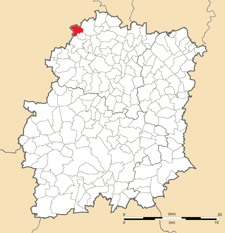 Carte de position de Villiers-le-Bâcle en Essonne (91)